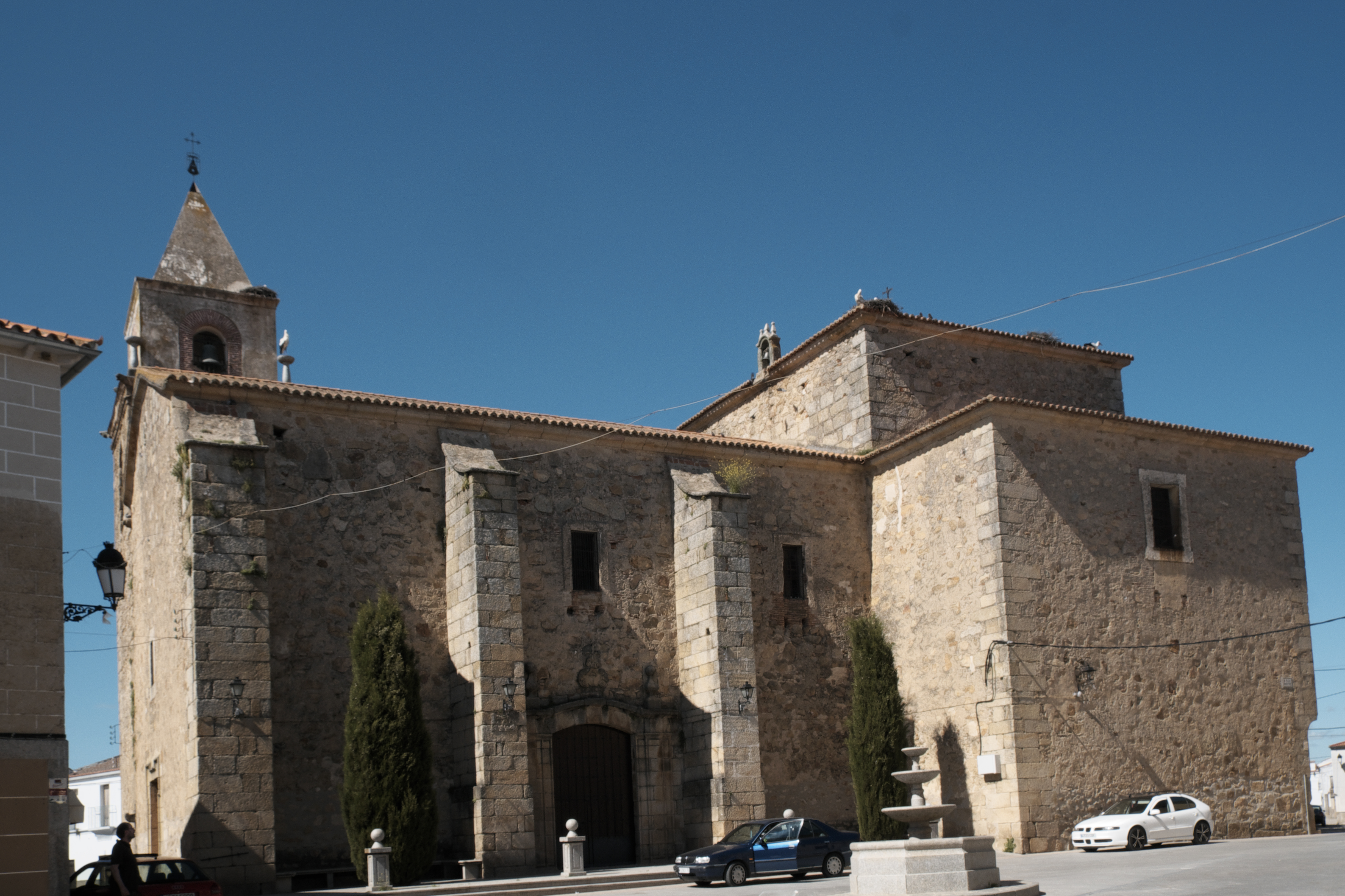 Katholische Kirche Iglesia de la Asunción (Mariä Himmelfahrt) in Torremocha in der Provinz Cáceres (Extremadura/Spanien)